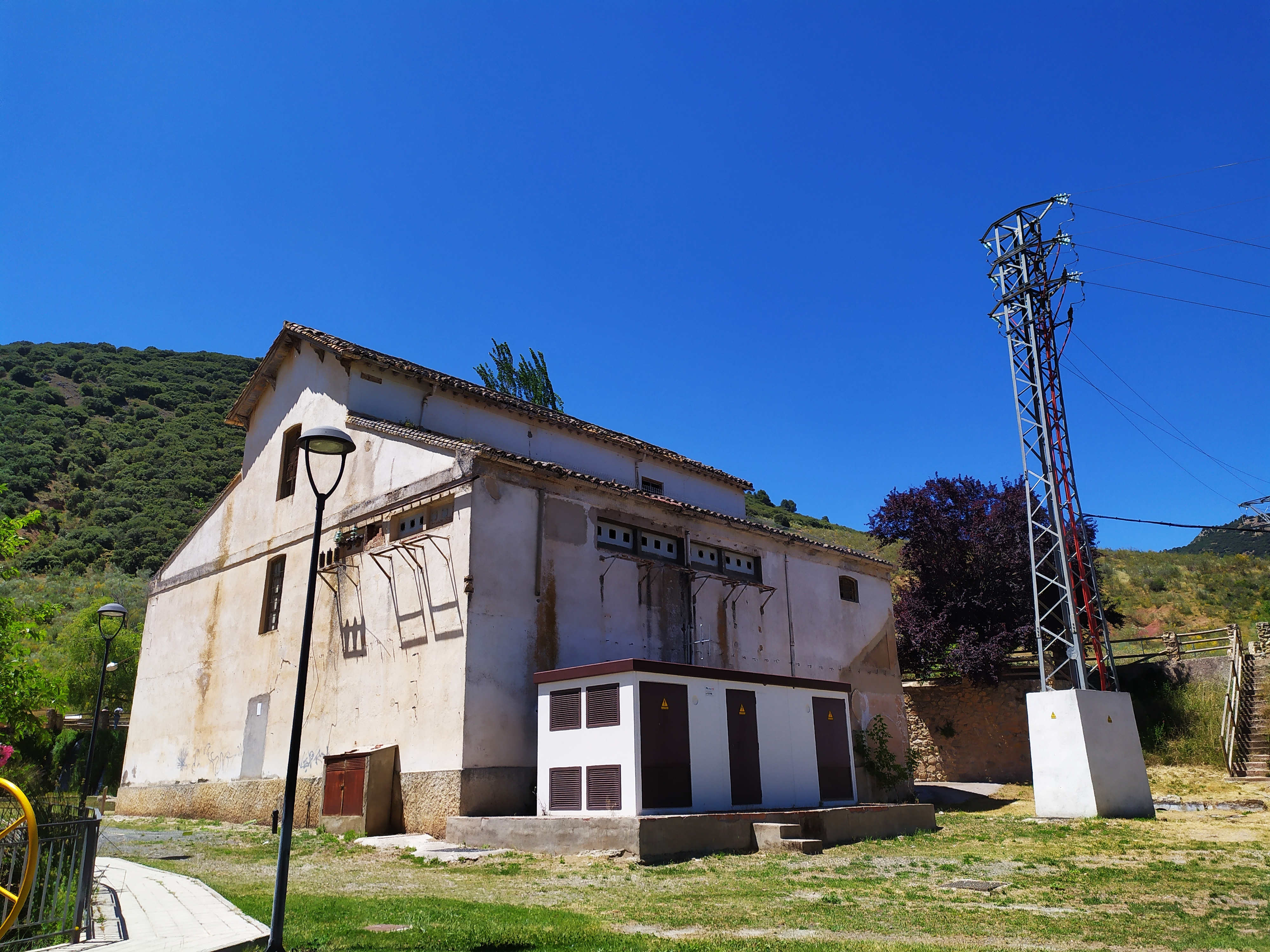 Hidroeléctrica de finales del S.XIX en el nacimiento del río Arbuniel en Arbuniel (Jaén)